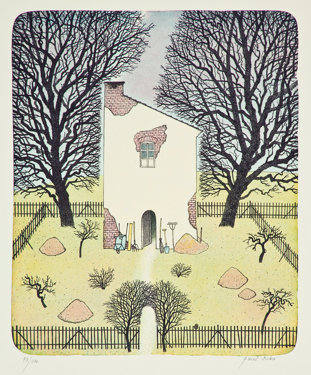 Pavel Sivko, Zahradníkův dům se pozná, barevná litografie